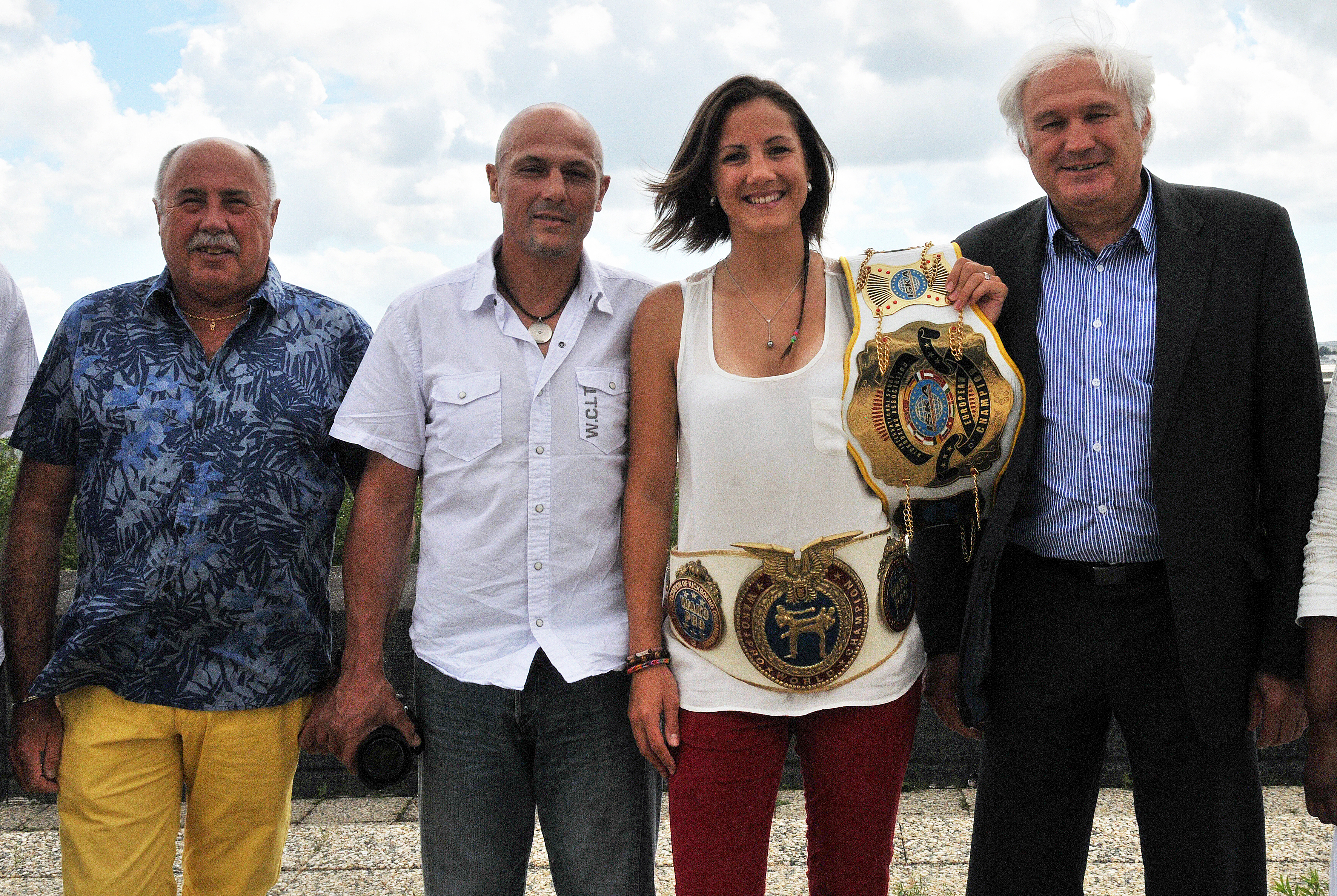 Cindy Perros entourée de : Charles Kermarec conseiller municipal et communautaire de Brest métropole océane, son père Eric Perros et Patrick Mr Appéré, 6ème adjoint de la ville de Brest chargé du Sport et communautaire de Brest métropole océane